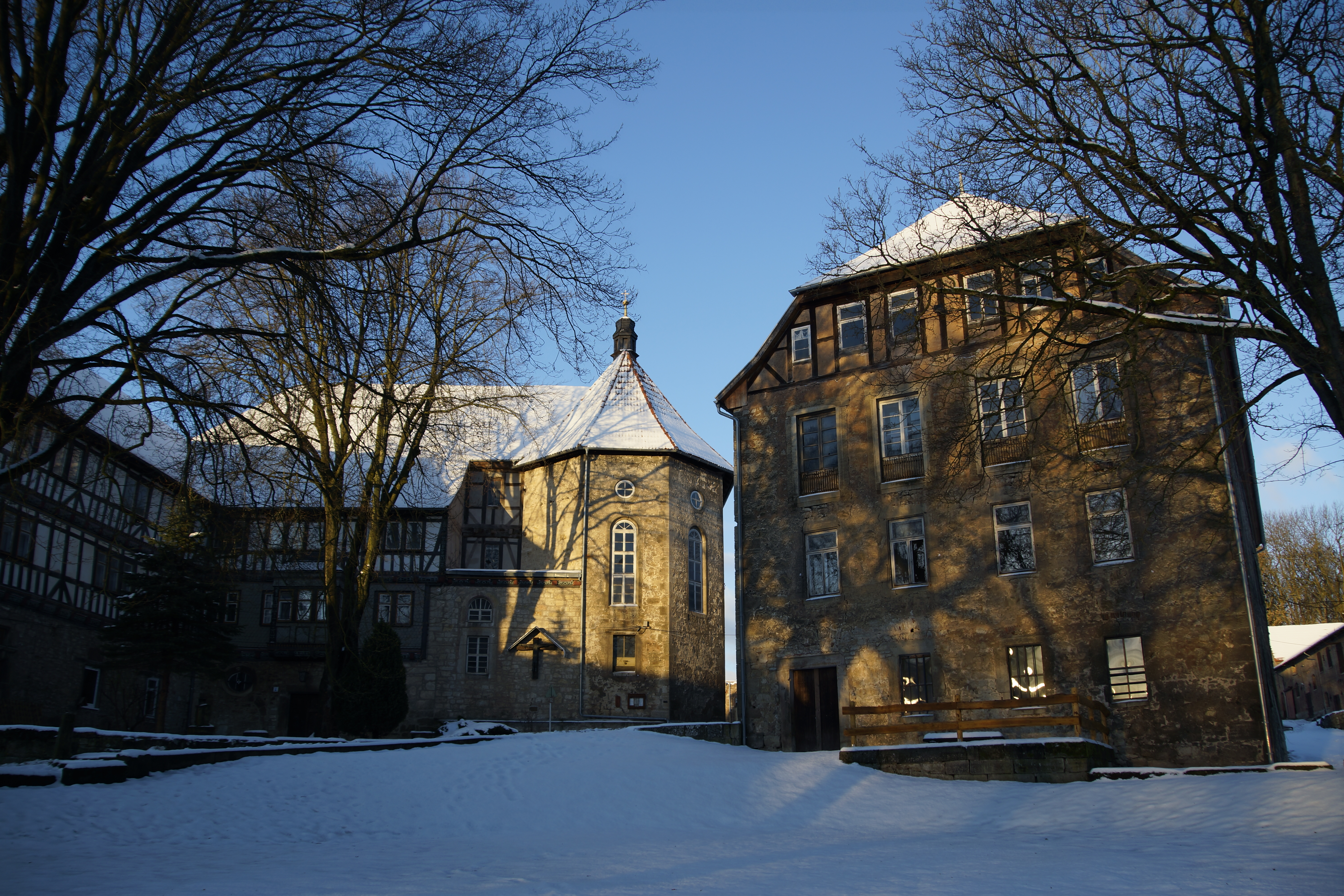 Ansicht des Klosters Anrode im Winter, rechts die Propstei